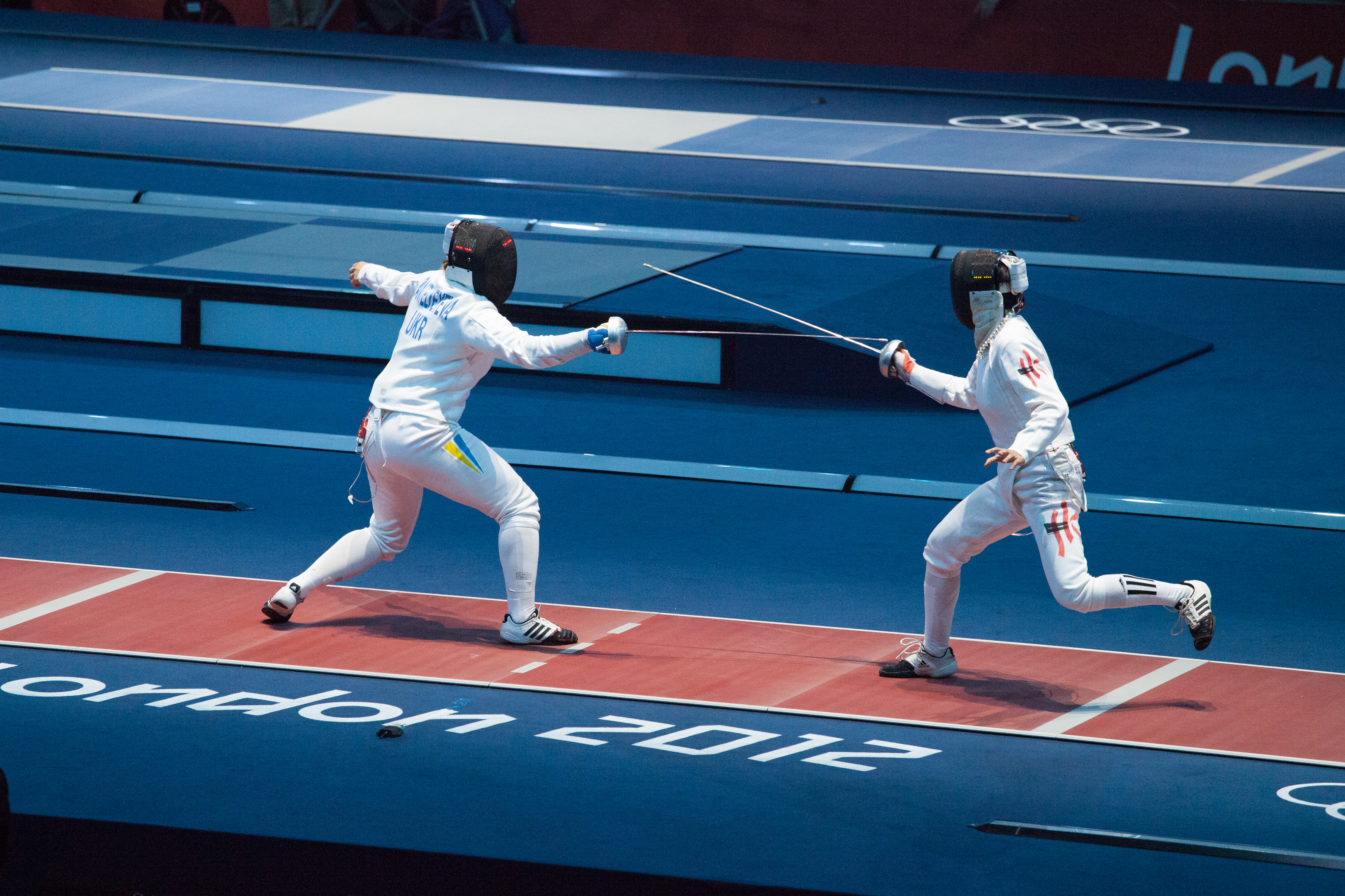 Kseniya Pantelyeyeva (left) vs Yeung Chui Ling